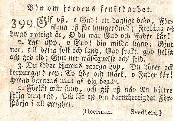 Giv oss, o Gud, ett dagligt bröd ur ett exemplar av 1819 års psalmbok, tryckt 1819.